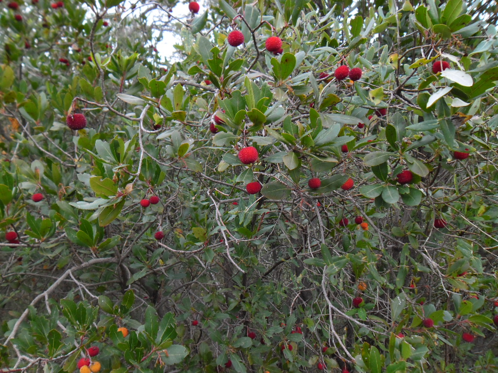 maginje na Koločepu